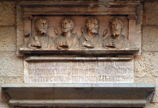 Relleu a la Plaça del Vi de Girona, ca. 1460, amb els Quatre Sants Màrtirs de Girona.